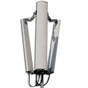 Antena Array, cellphone antenna, antena telefonía movil